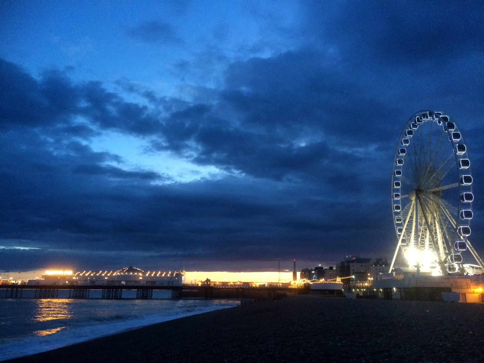 Největší turistickou atrakcí v letovisku Brighton je vyhlídkové molo nazvané Brighton Pier, kterému vévodí obří ruské kolo